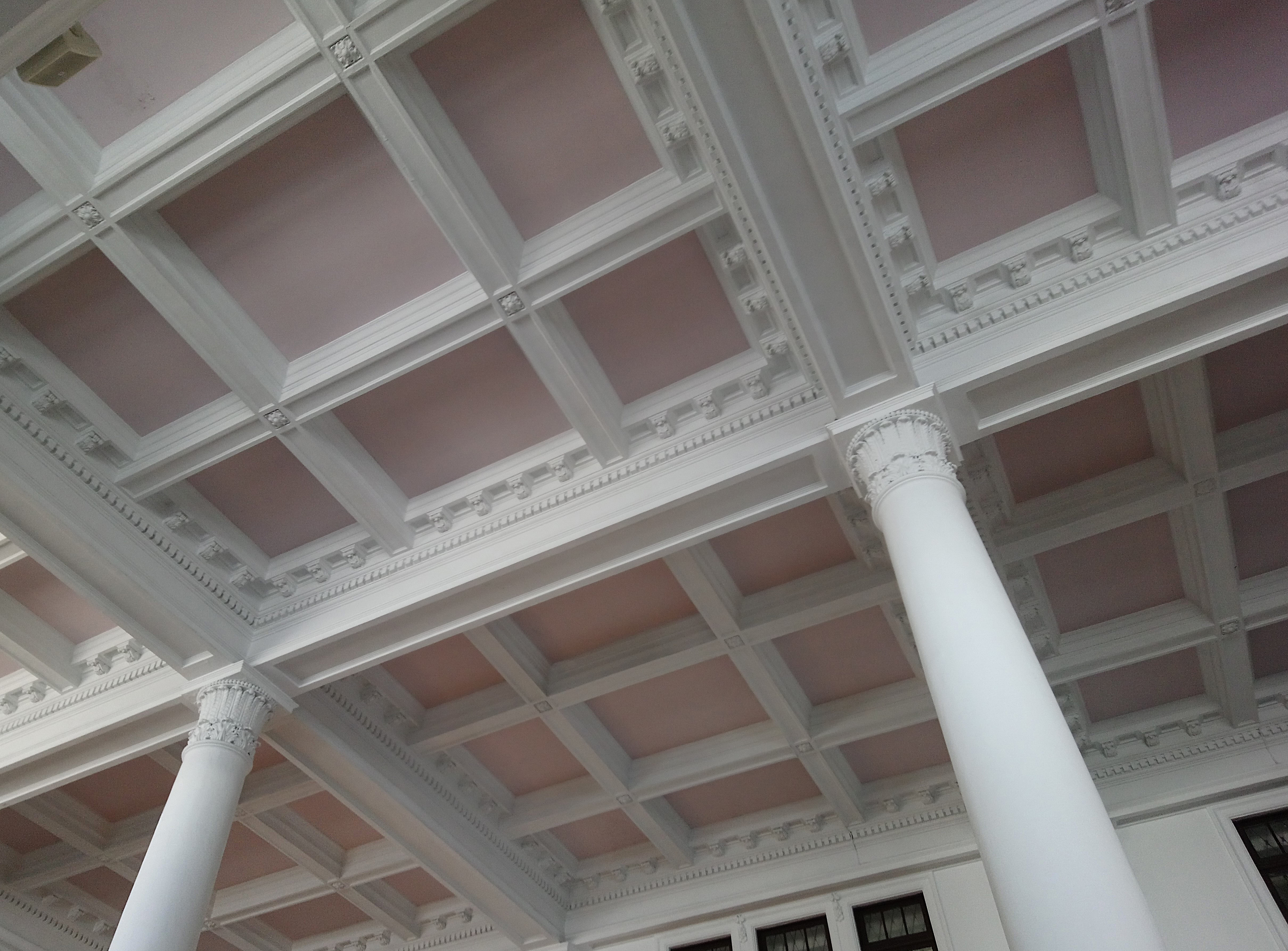 臺北郵局大廳天花板，臺北市中正區城內次分區光復里